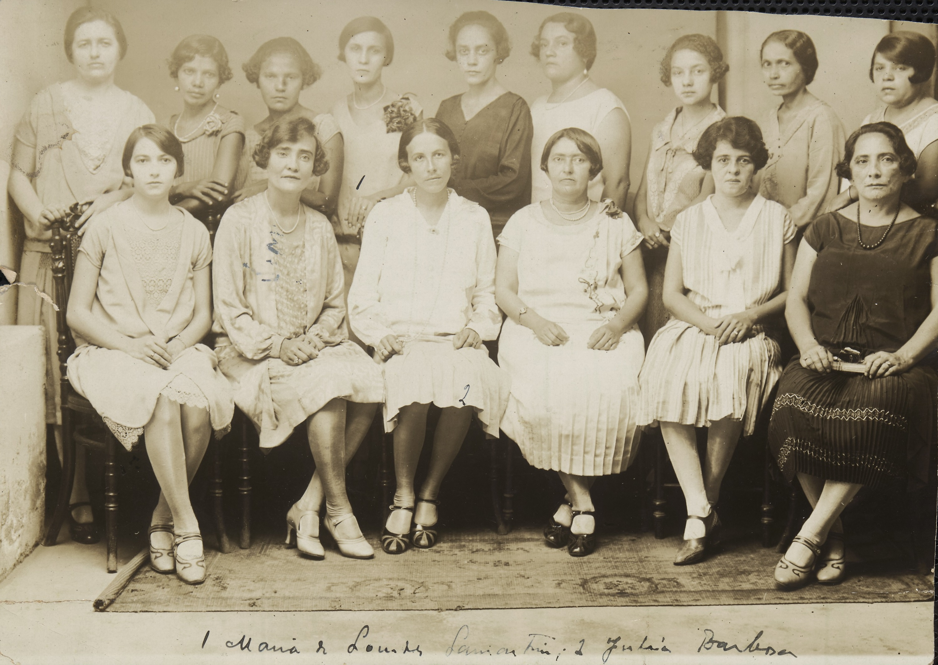 Primeiras eleitoras do Brasil, Natal, Rio Grande do Norte. Fundo: Federação Brasileira pelo Progresso Feminino.